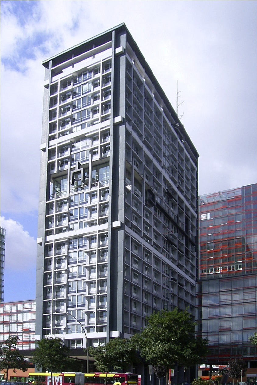 Das ehemalige Polizeipräsidium Beim Strohhause 31 in St. Georg wurde von 1958 bis 1966 nach Plänen von Hans Atmer und Jürgen Marlow erbaut. Die Inspiration durch Le Corbusier ist unverkennbar. Heute ist das Gebäude Mittelpunkt des neuen Berliner Tor-Center.